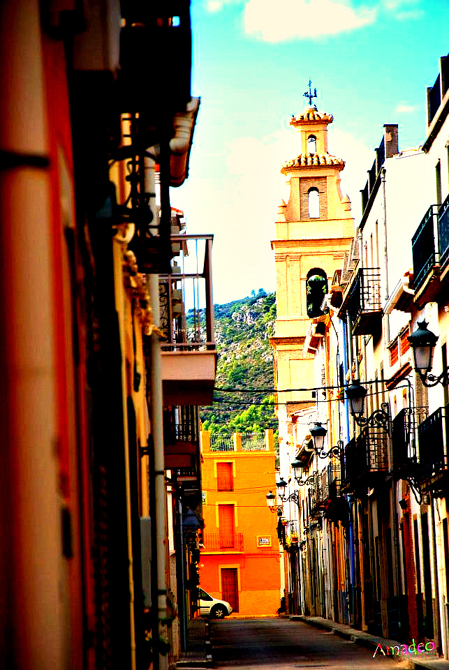 Un carrer típic d´aquest bell poble de la Vall de Pop